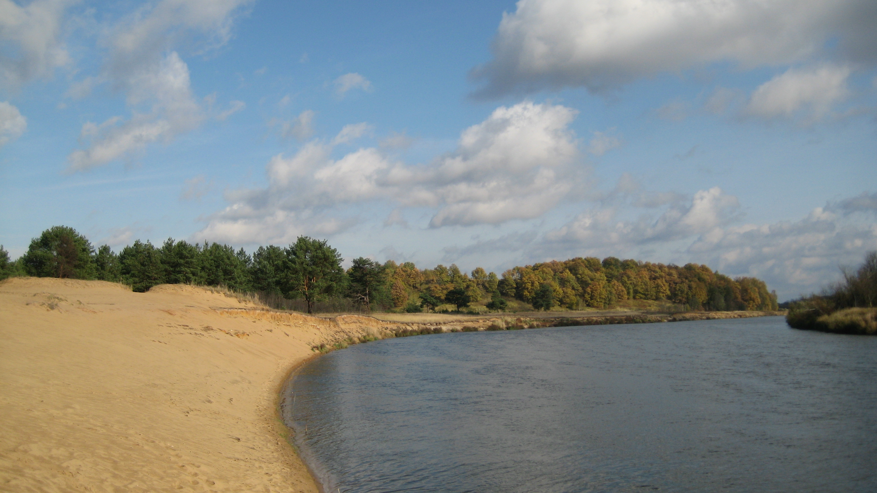 Вид на Осовец